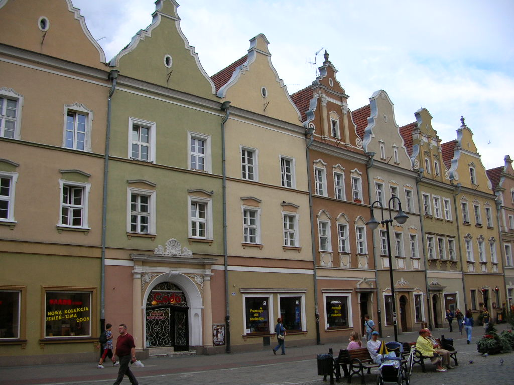 Opole - kamieniczki na Opolskim rynku Autor - Bartek Wawraszko ( Bast )